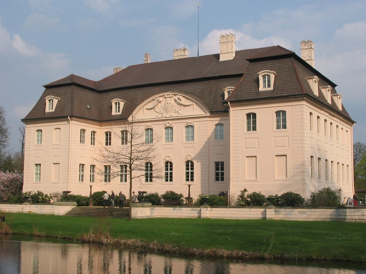 Schloss Branitz im Fürst-Pückler-Park Branitz bei Cottbus. 17. April 2005.